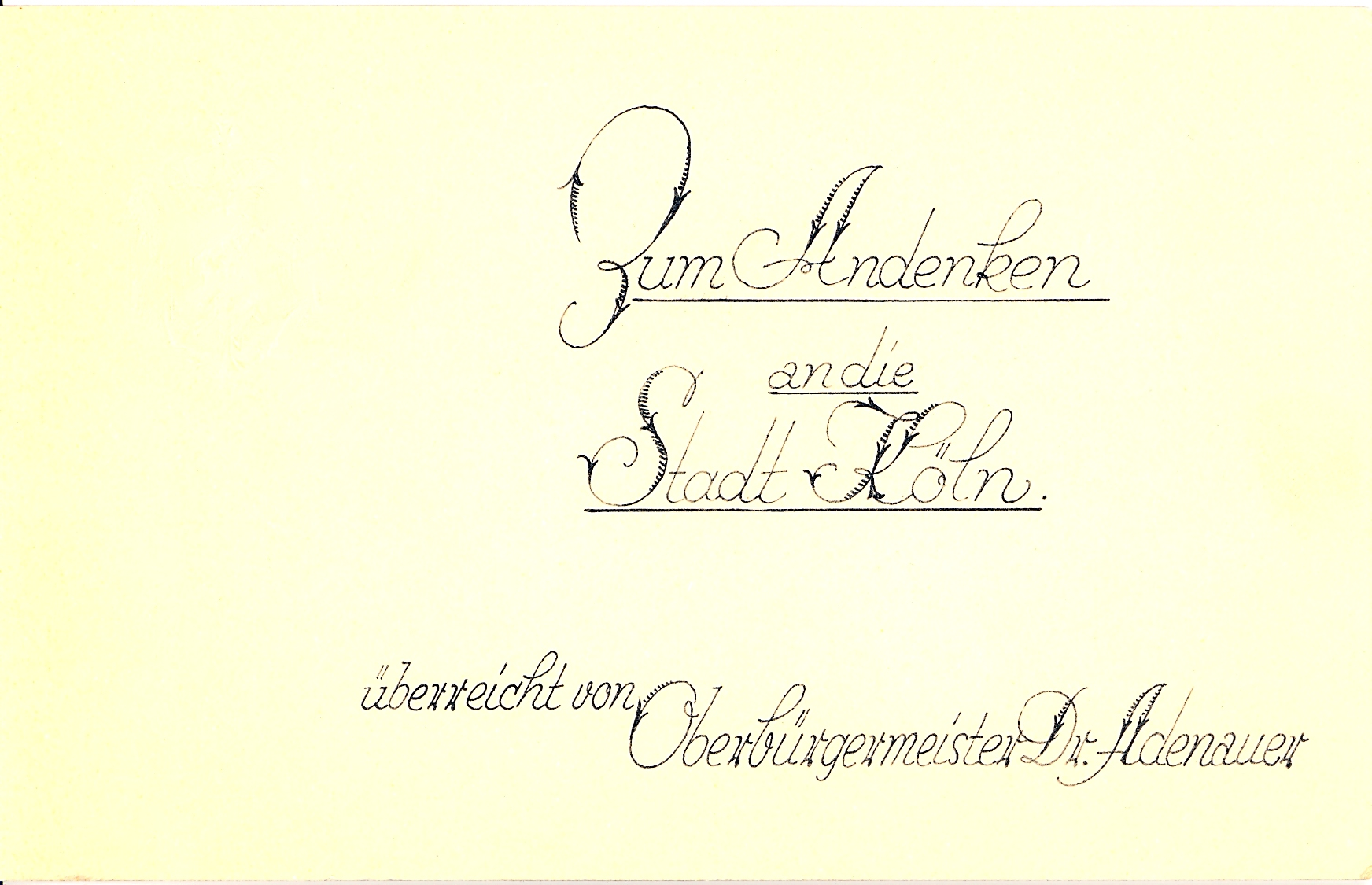 Widmungskarte von Oberbürgermeister Dr. Konrad Adenauer in dem Buch Köln - Werden, Wesen, Wollen einer Deutschen Stadt von Hermann Keussen, Bruno Kuske u.a., 1928, Hrsg. Stadt Köln